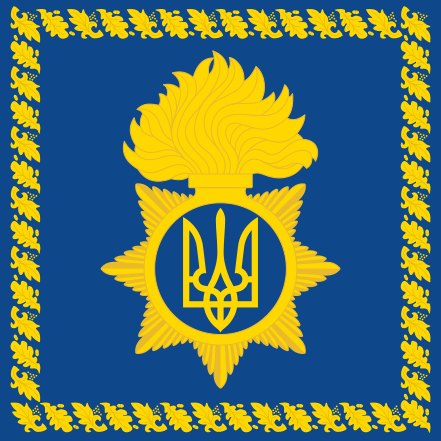 Штандарт, Командувач Національної гвардії України, 2017.